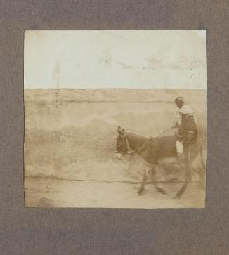 Foto von August Macke, das einen Eselreiter in Tunis zeigt. Das Foto diente als Vorlage für das Aquarell mit dem Titel "Eselreiter", das Macke auf der Tunisreise malte.